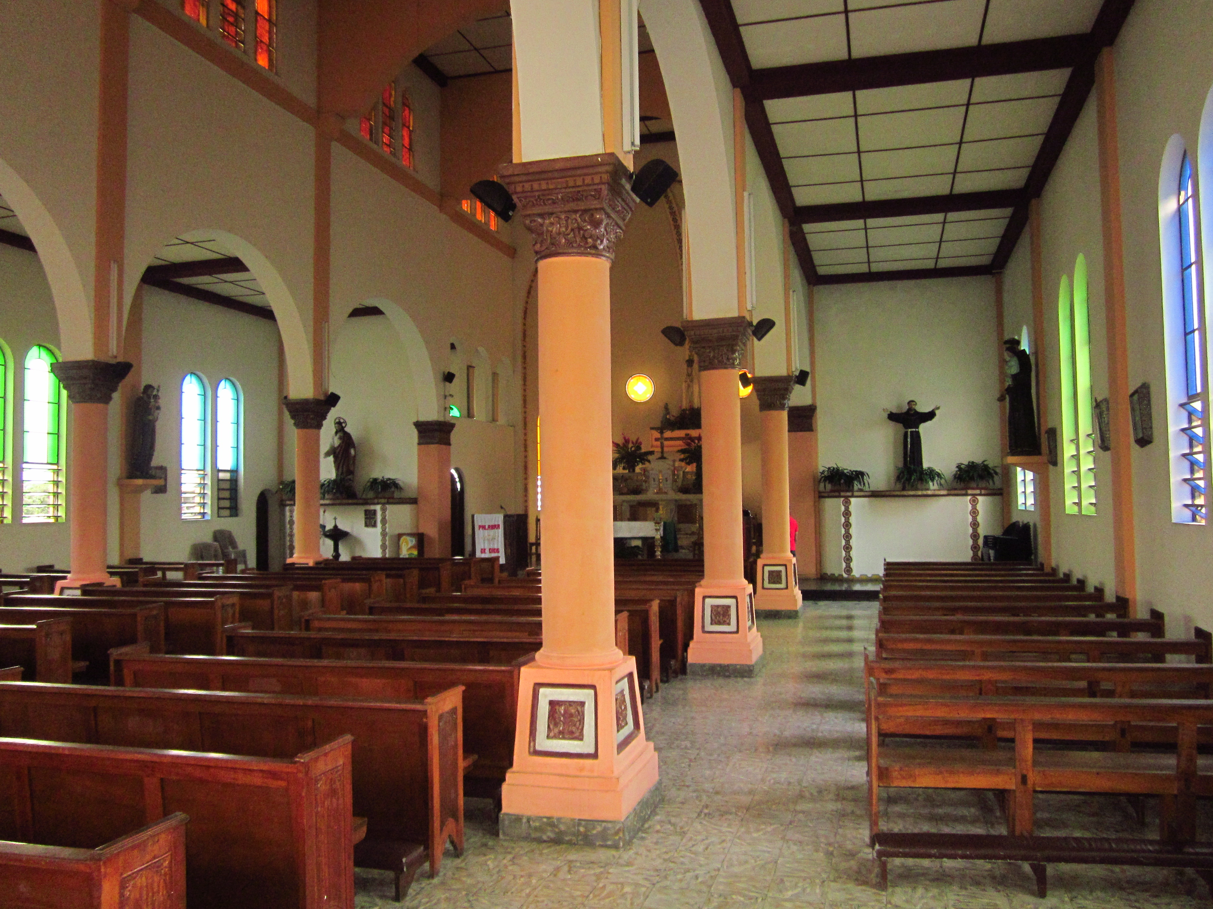 Vista interior de la Parroquia Santuario de Nuestra Señora de Fatima ubicada en carretera a Los Planes de Renderos